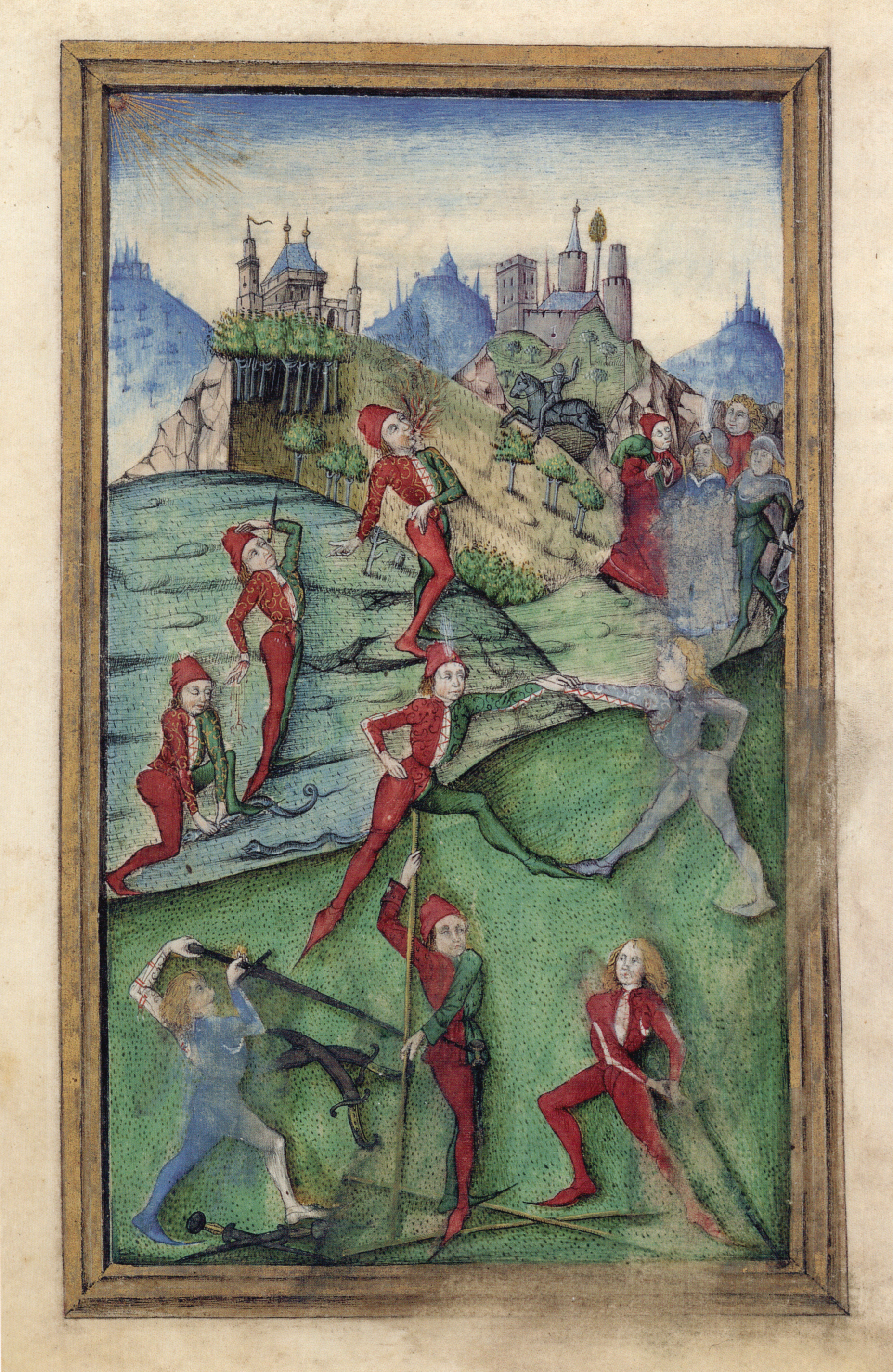 Mittelalterliches Hausbuch von Schloss Wolfegg Fol. 3r: Einführungsminiatur "Gaukler und Artisten" (Figuren z. T. gearbeitet nach der "Menschen-Vier" aus dem "Großen Kartenspiel des Meisters E. S. von 1463)